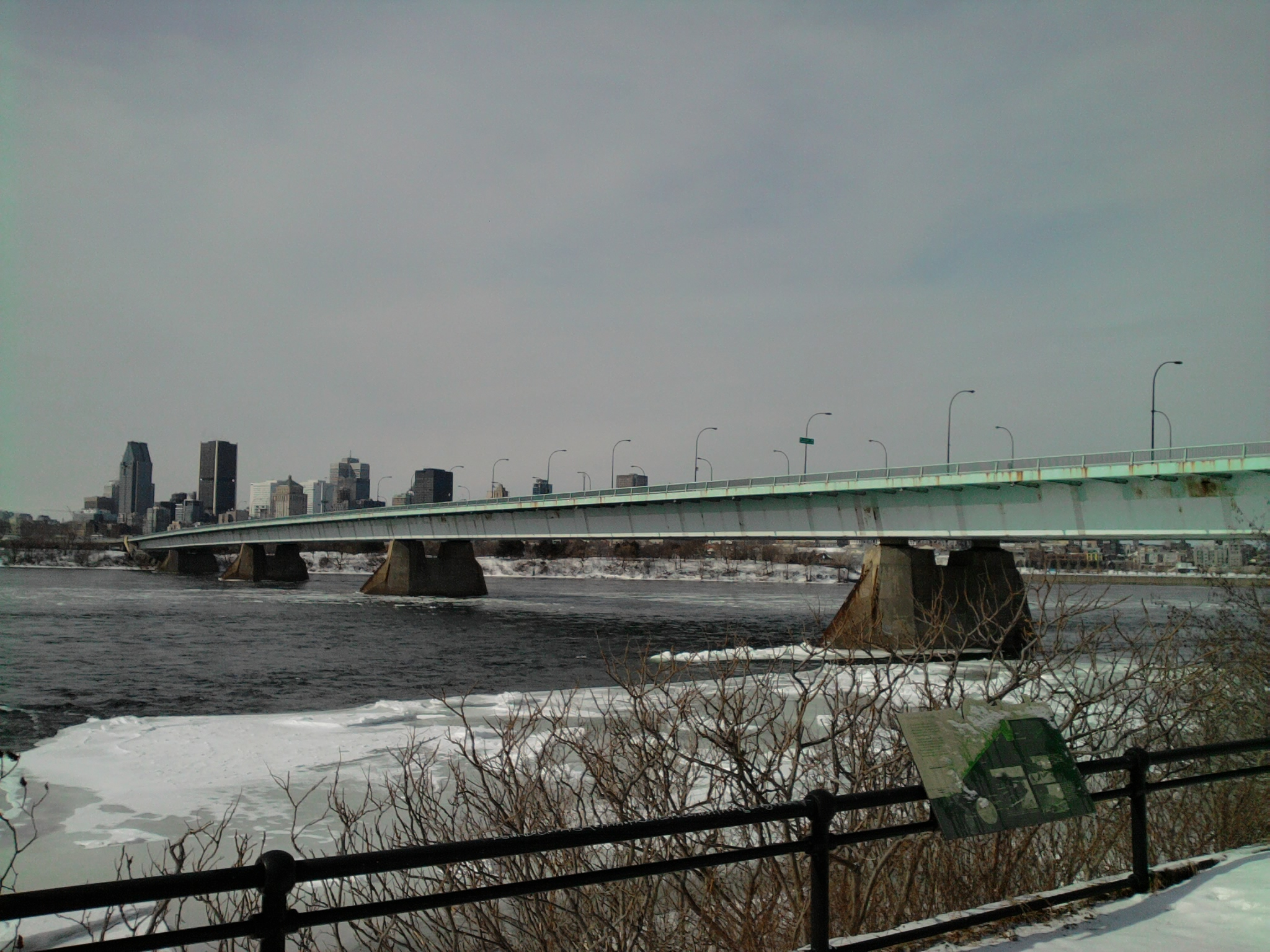 Le Pont de la Concorde, à Montréal Québec en hiver 2014